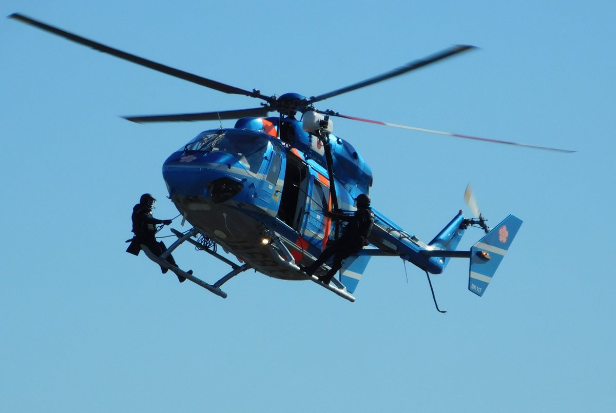 2017年の埼玉県警察年頭視閲式にて、県警航空隊のヘリコプター「むさし」上で降下を準備するRATS隊員。